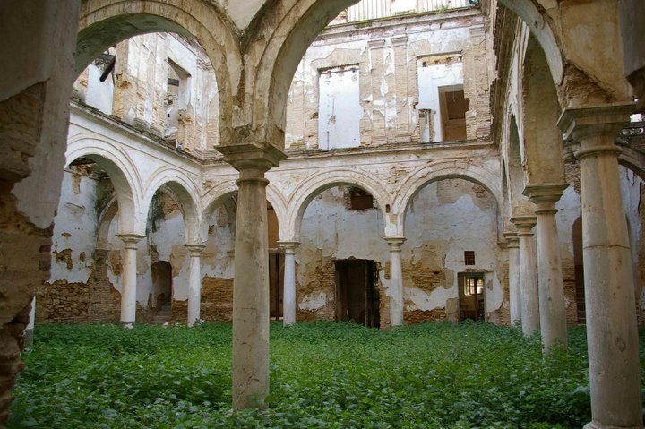 Patio construido en el siglo XVII de la Casa de Arizón en Sanlúcar de Barrameda